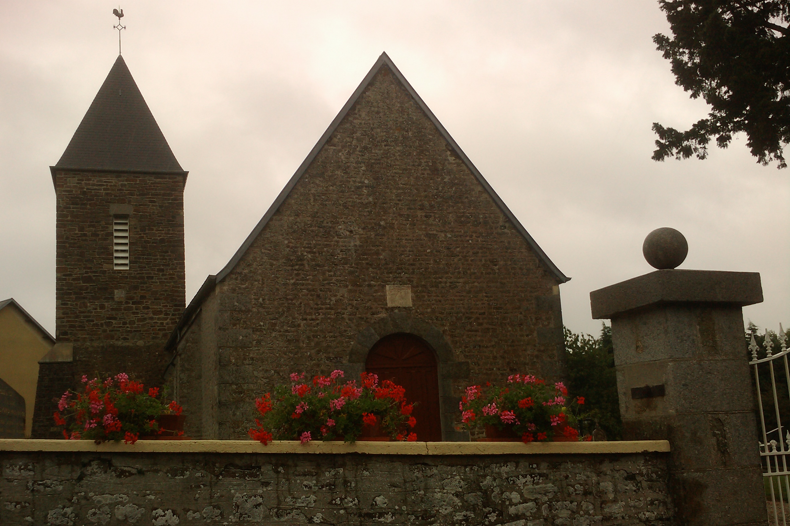 La Chapelle-du-Fest, commune associée à Saint-Amand